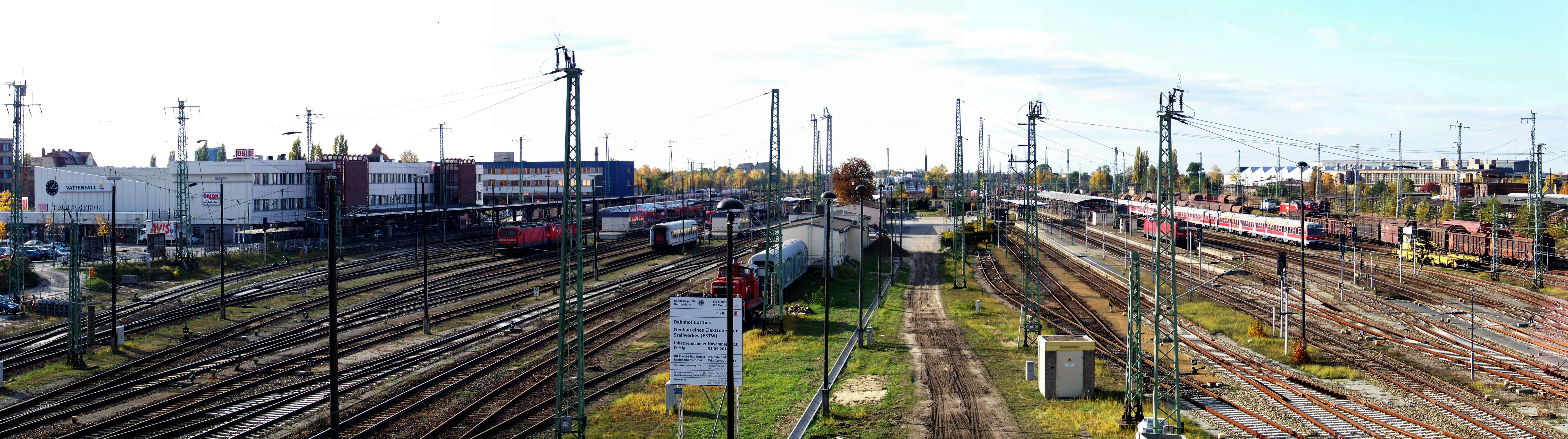 Panorama des Cottbuser Hauptbahnhofes von der Brücke Bahnhofstraße